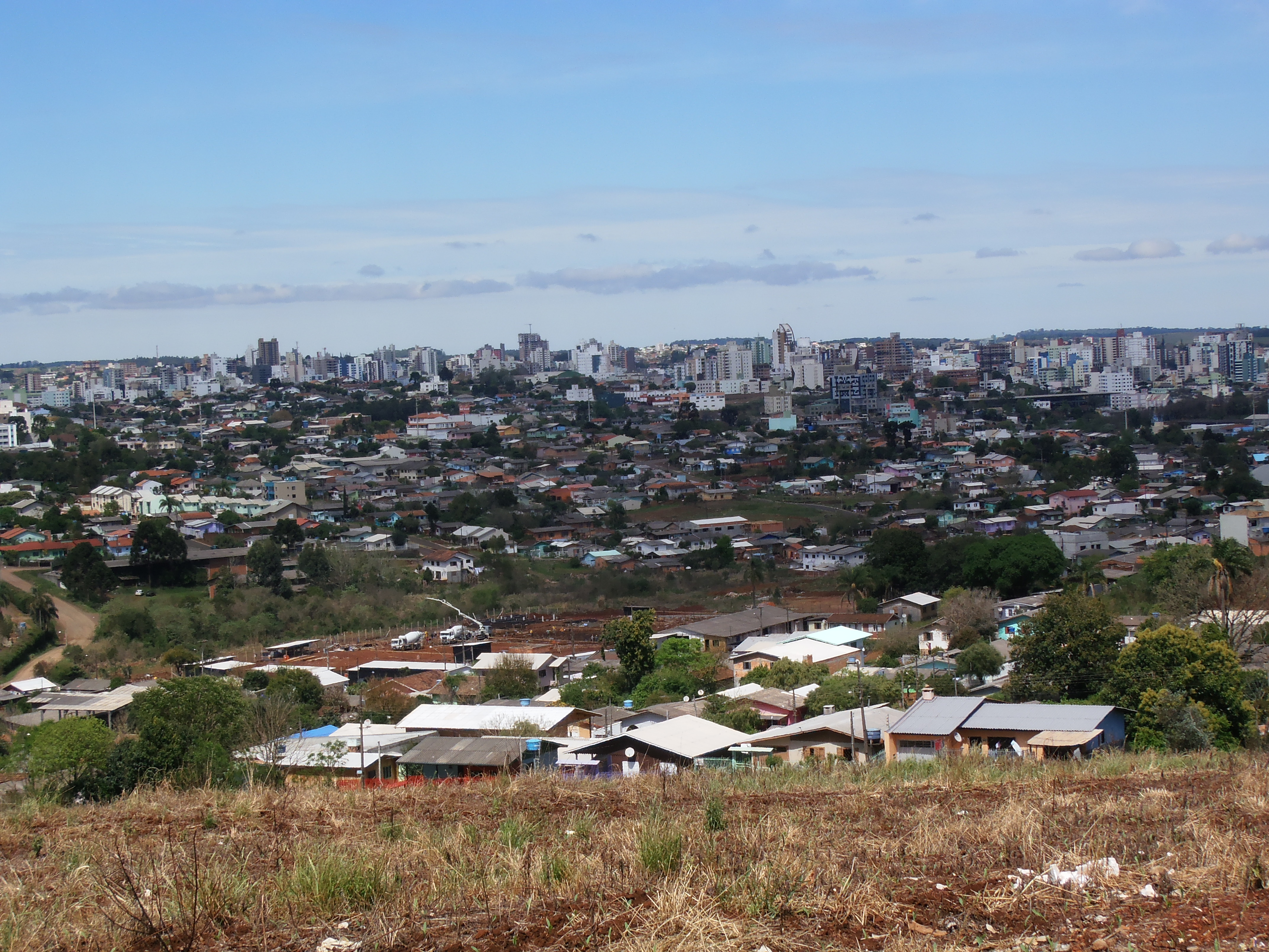 Chapecó 2013: vista do bairro Vila Real